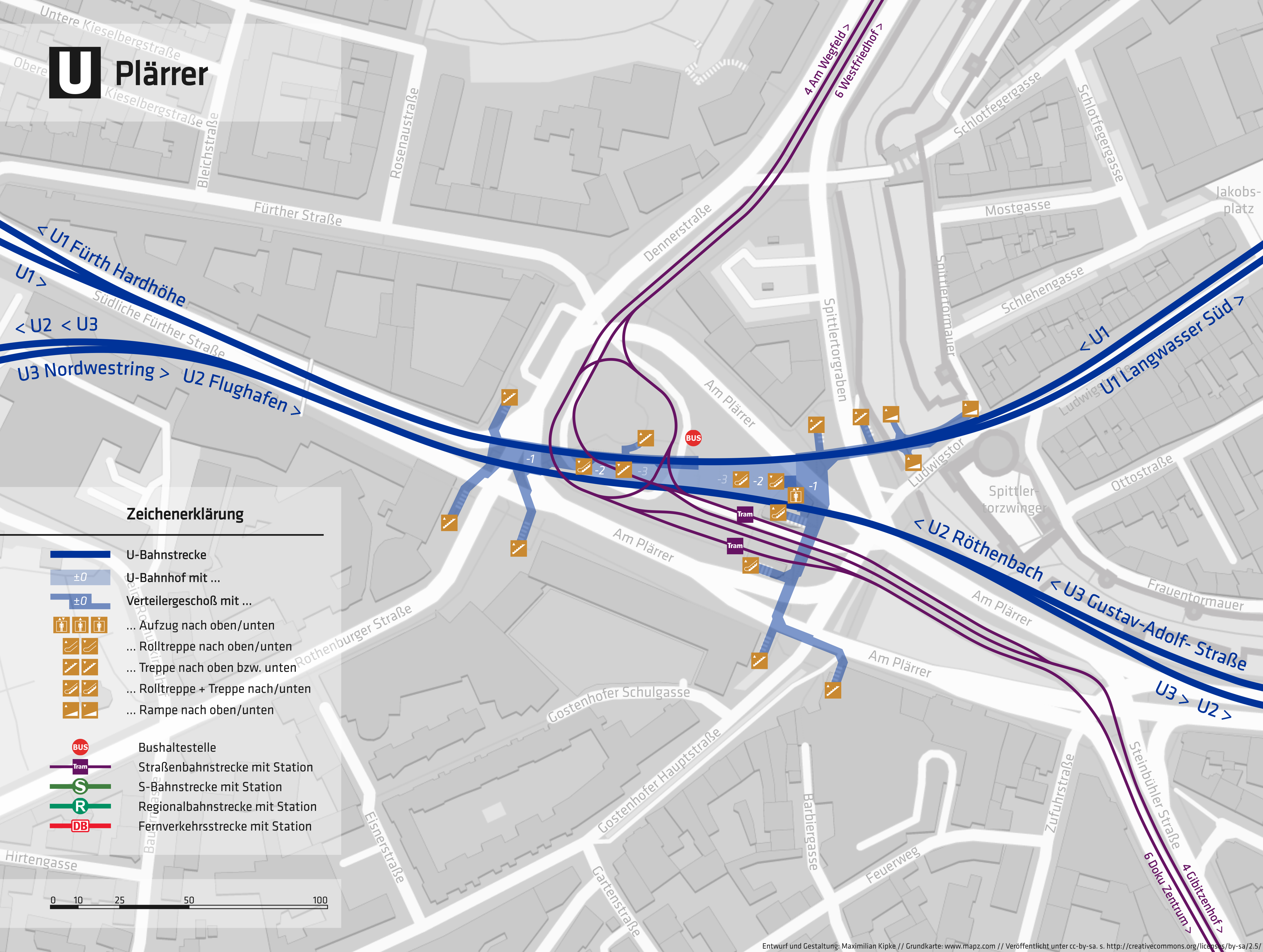 Übersichtsplan U-Bahnhof Plärrer in Nürnberg